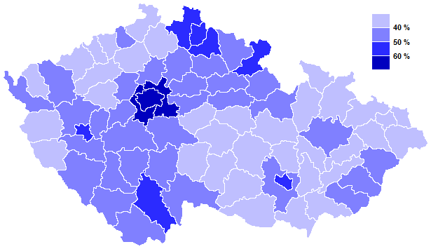 Podpora Karla Schwarzenberga v druhém kole prezidentských voleb 2013 podle okresů